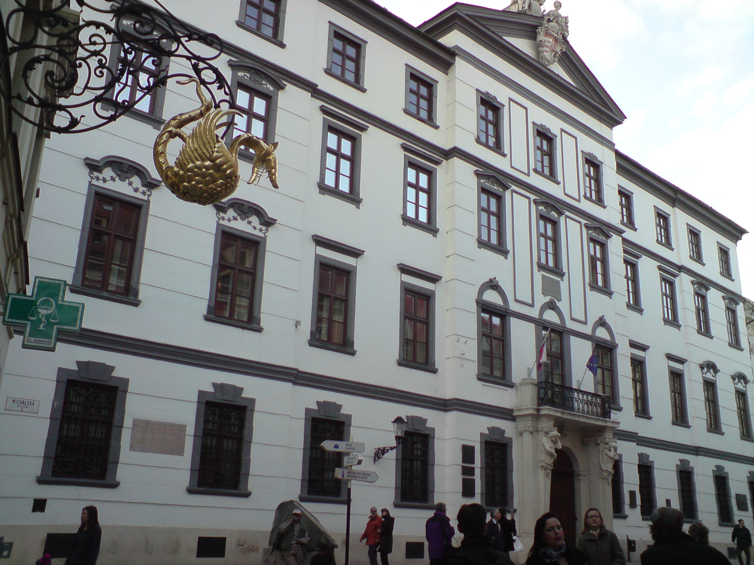 Palác Uhorskej kráľovskej komory, Michalská 1, Staré Mesto, Bratislava I